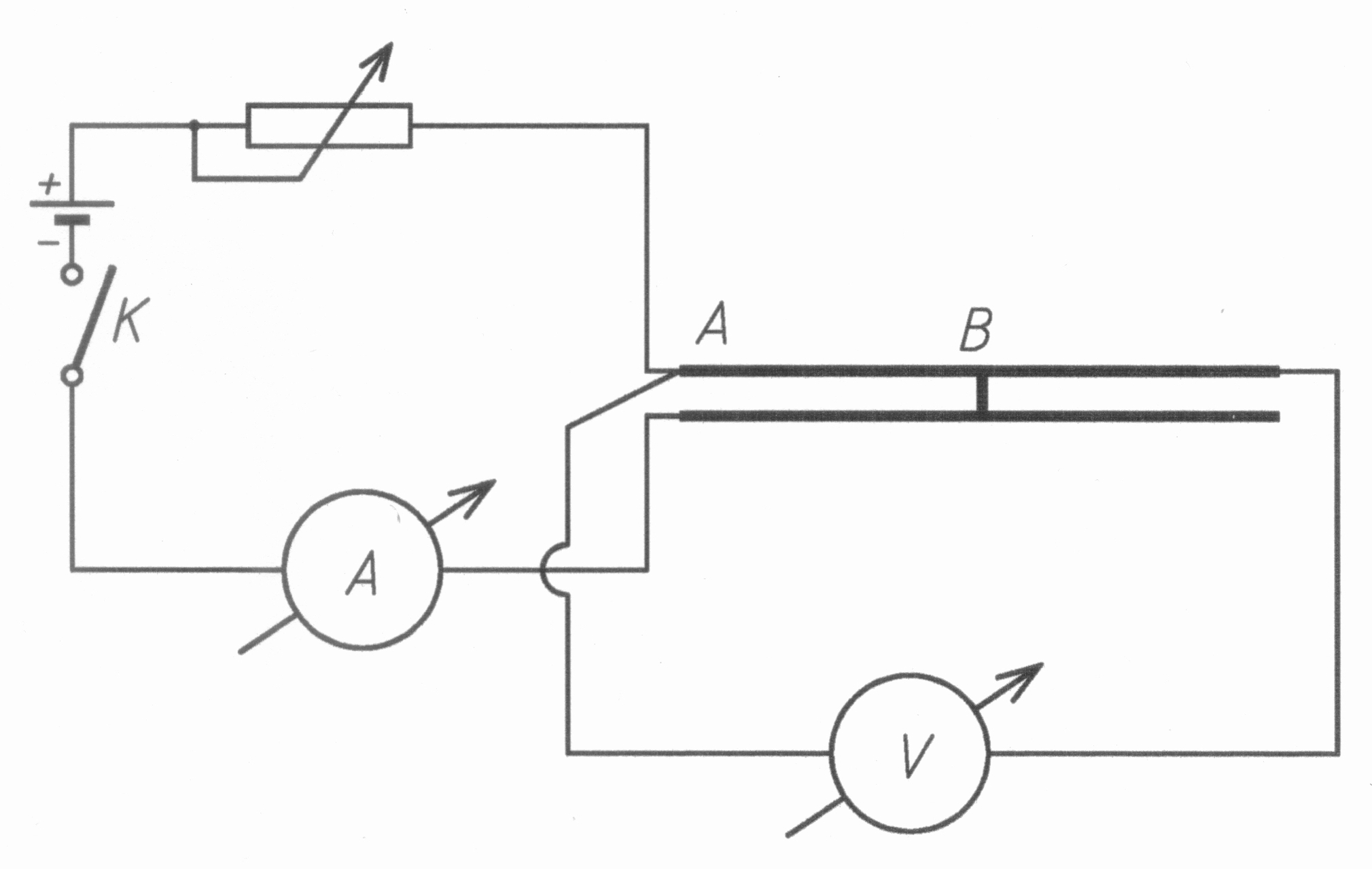 Zárlati hely keresése kábeleknél